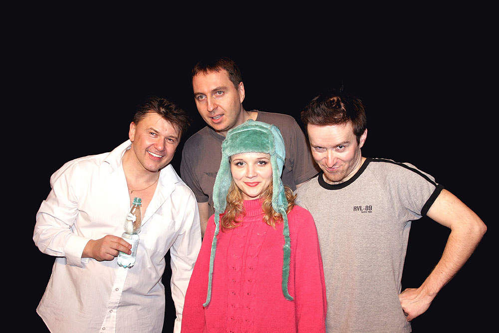 Grupa Rafała Kmity - od lewej: Piotr Plewa, Arkadiusz Lipnicki, Oksana Pryjmak, Karol Wolski (28.03.2009).